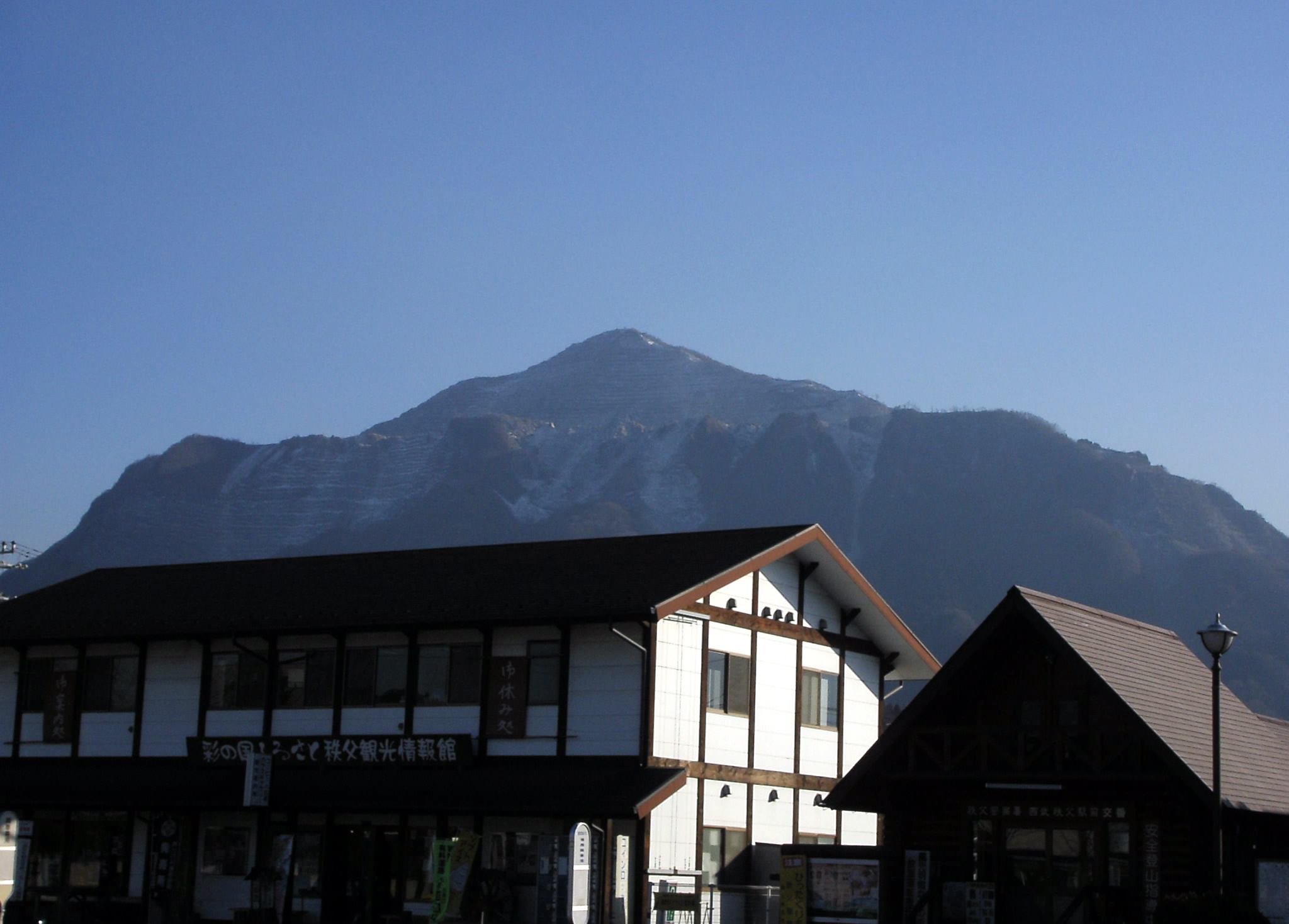 西武秩父駅前より望む武甲山 Mt.Bukou